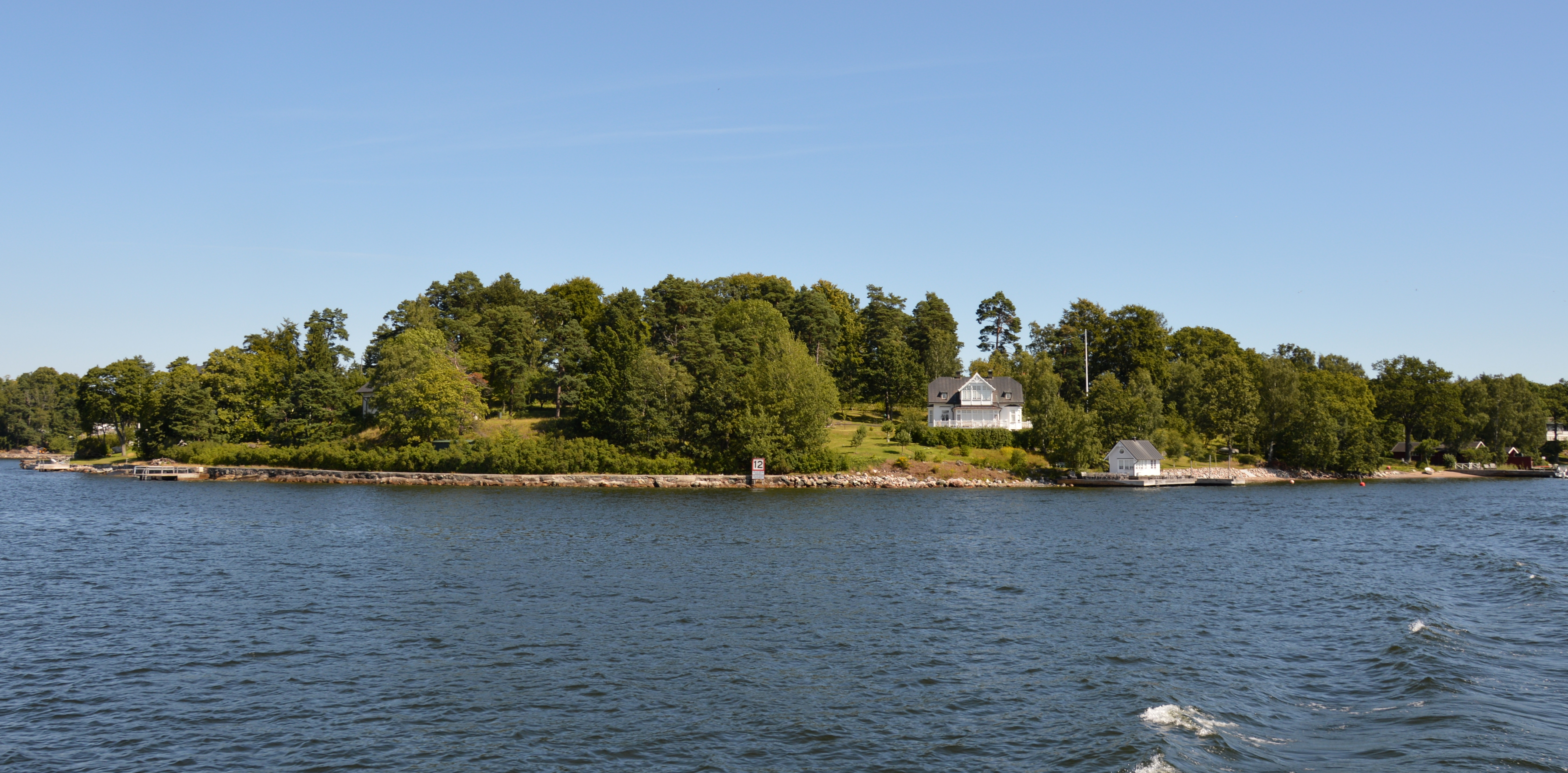 Vasholmen